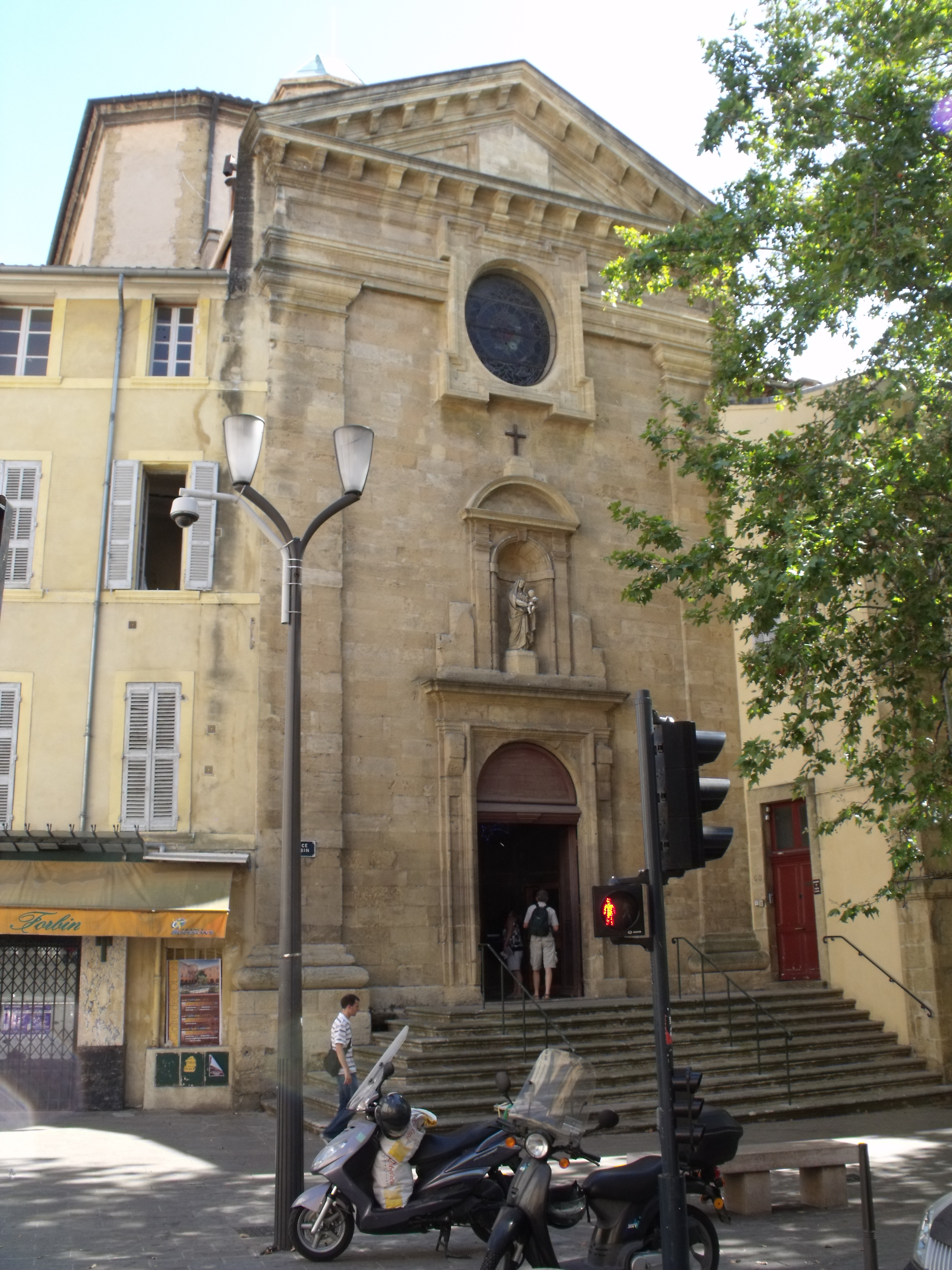 Façade de la chapelle des Oblats. Aix-en-Provence.